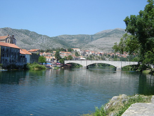 Kameni most u Trebinju.